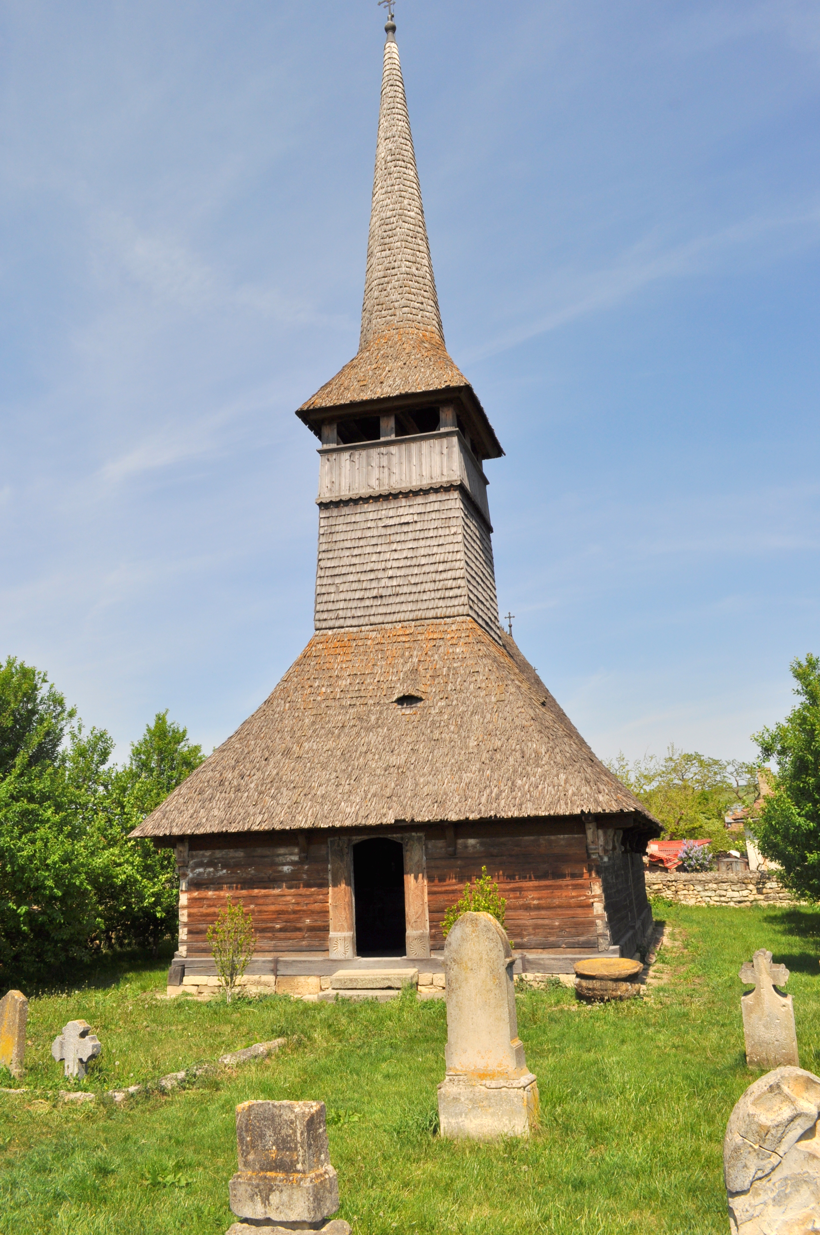 Biserica de lemn din Apahida, județul Cluj